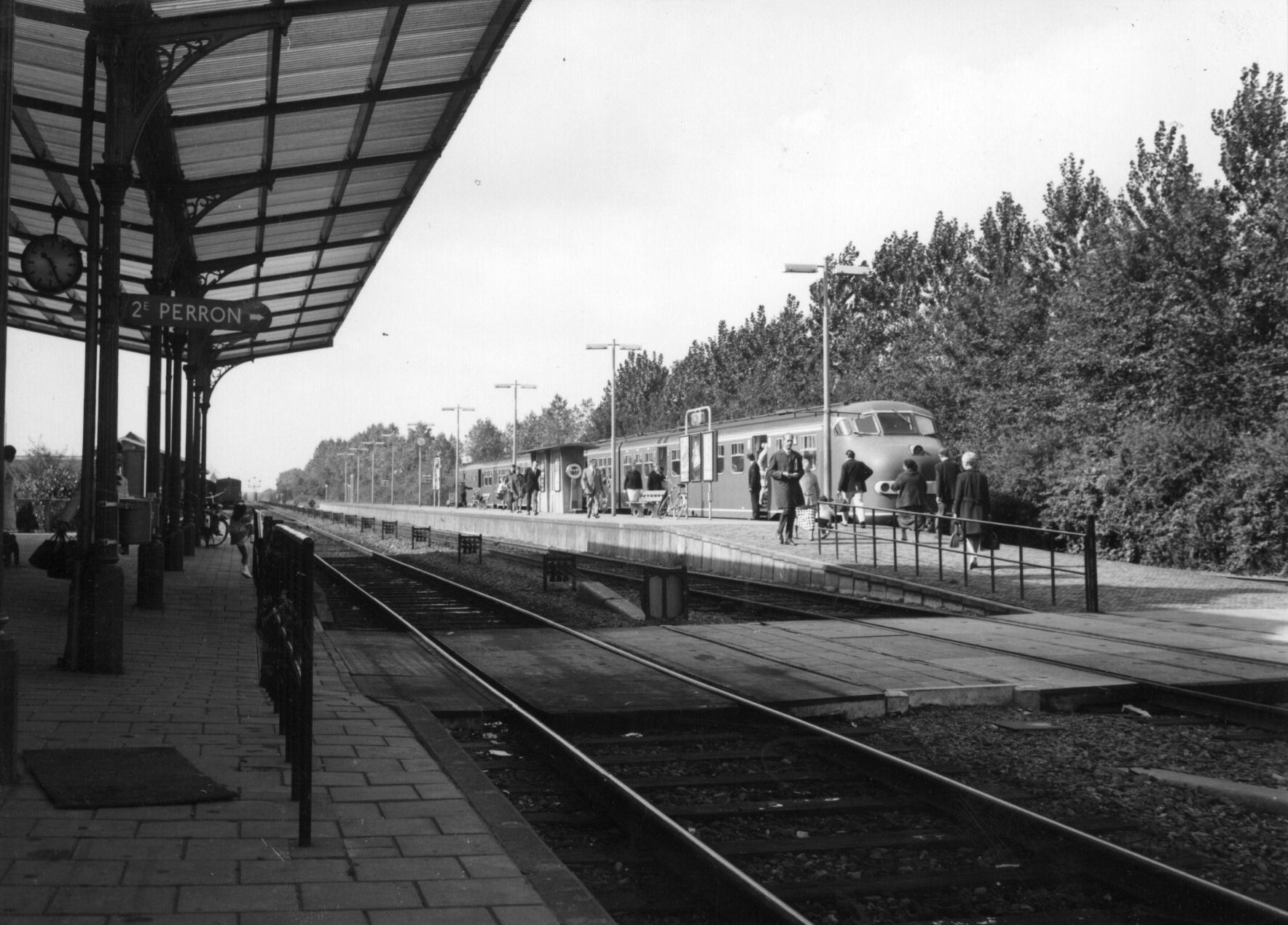 Gezicht op de perrons van het N.S.-station Tiel te Tiel met het diesel-electrische treinstel nr. 145 (DE 3, plan U) van de N.S.